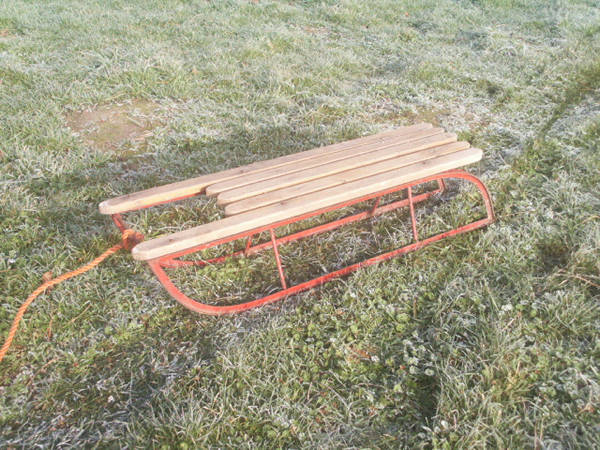 Sleigh